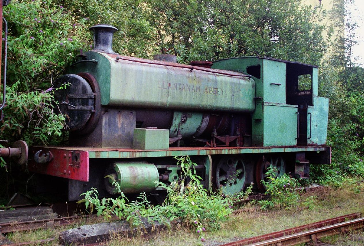 Llantanam Abbey